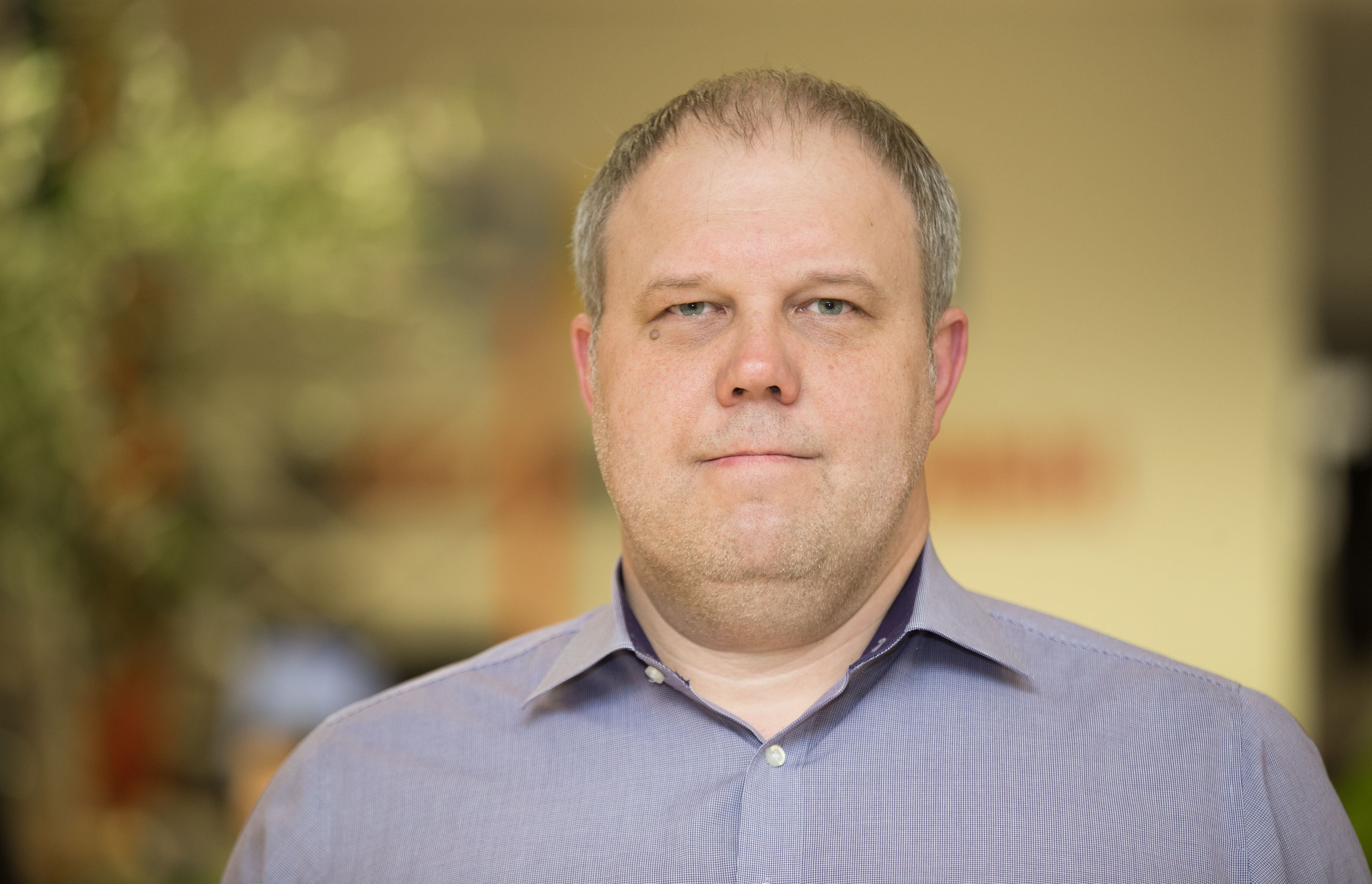 Peep Pahv